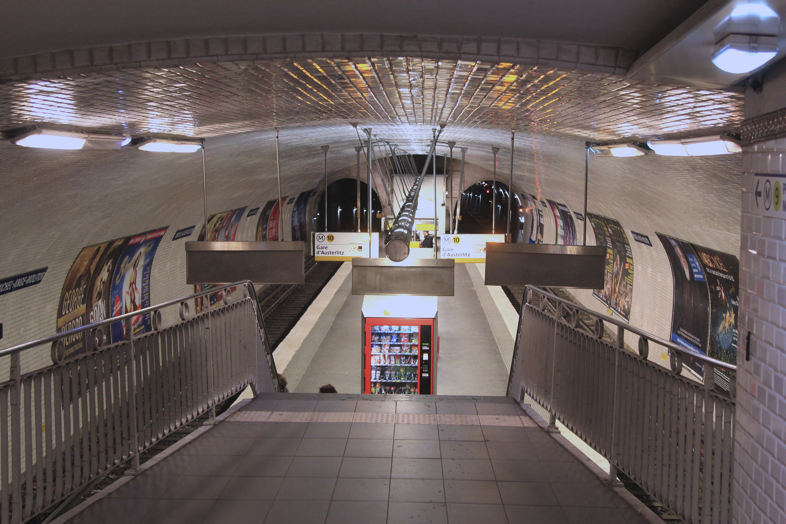 Quai de la station Michel-Ange - Molitor de la ligne du métro de Paris.